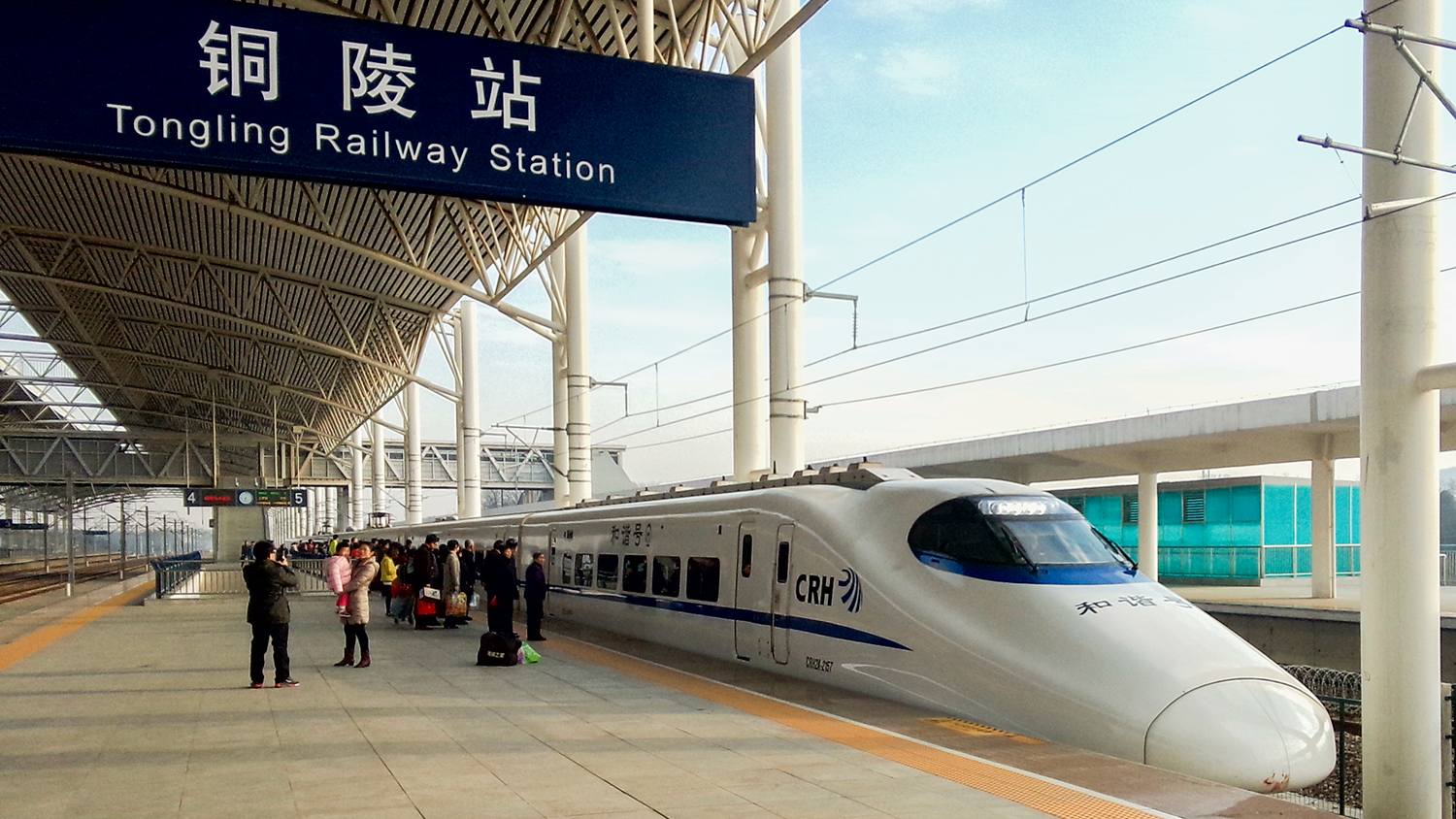 D5653次列车停靠铜陵站